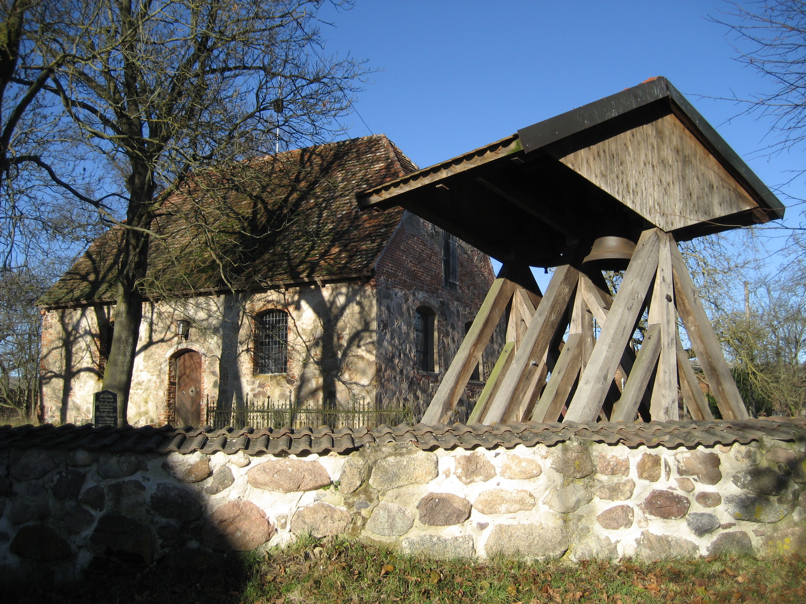 Feldsteinkirche mit Glockenstuhl und Friedhofsmauer in Gorkow, aus Blickrichtung Süden.